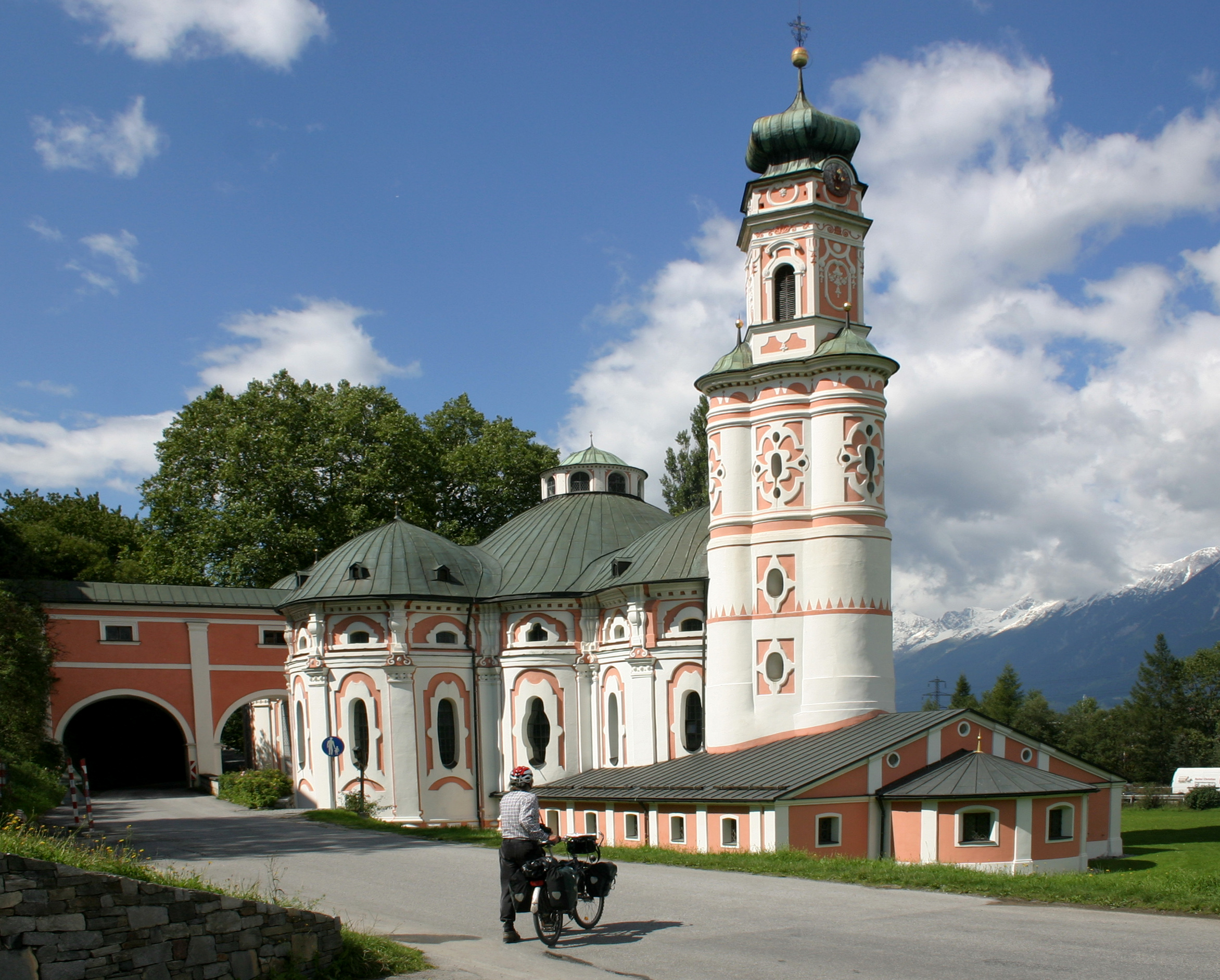 Volders, St. Karl Borromaeus